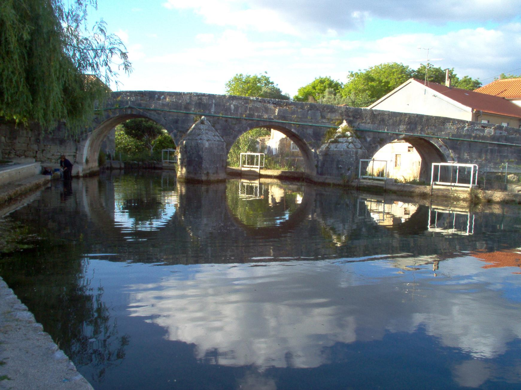 Ponte sobre o rio Anços, 2005, Redinha This file was uploaded for Wiki Loves Monuments in Portugal with the unique identifier 97004782.